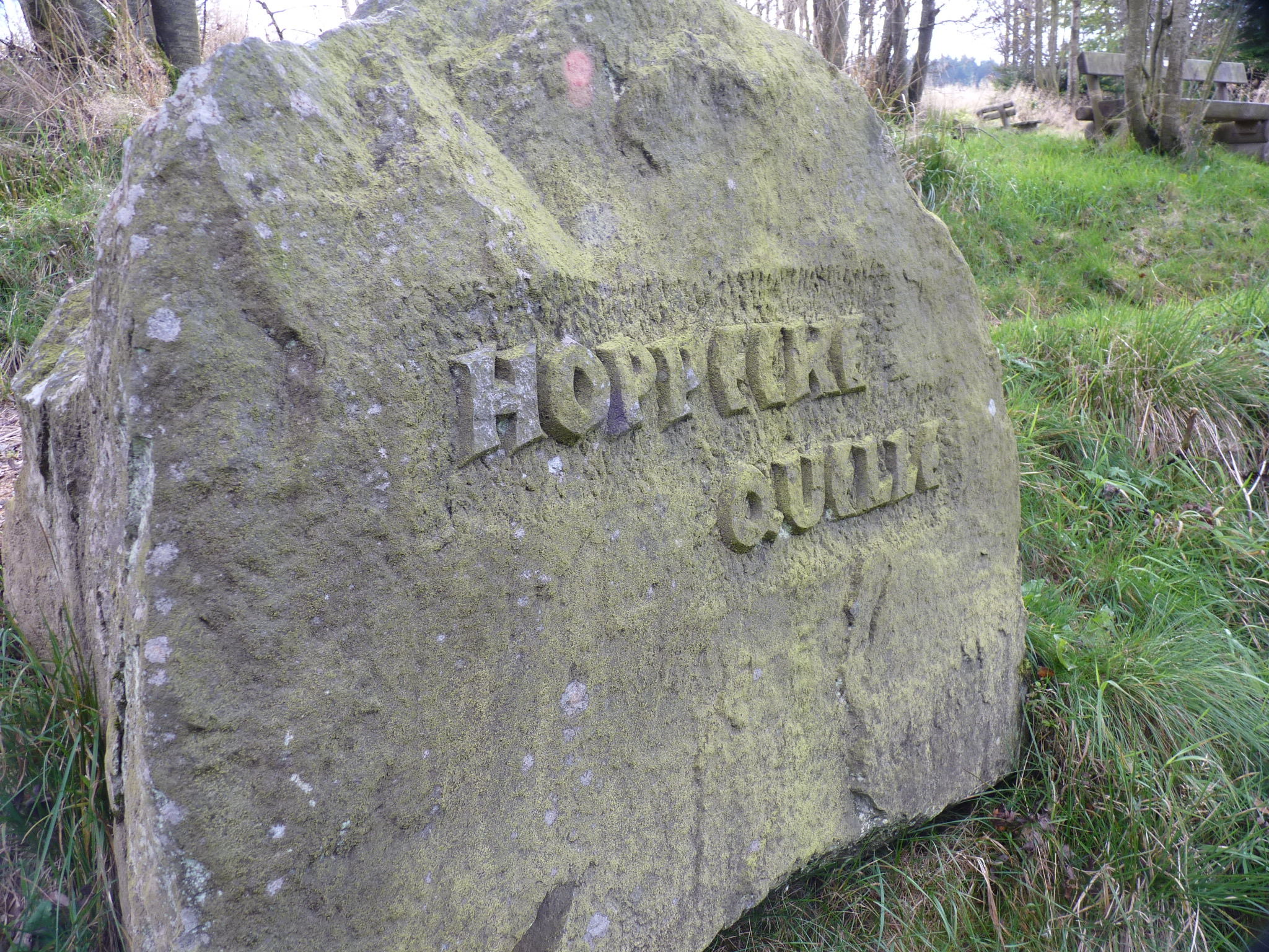 Stein an der Hoppeckequelle